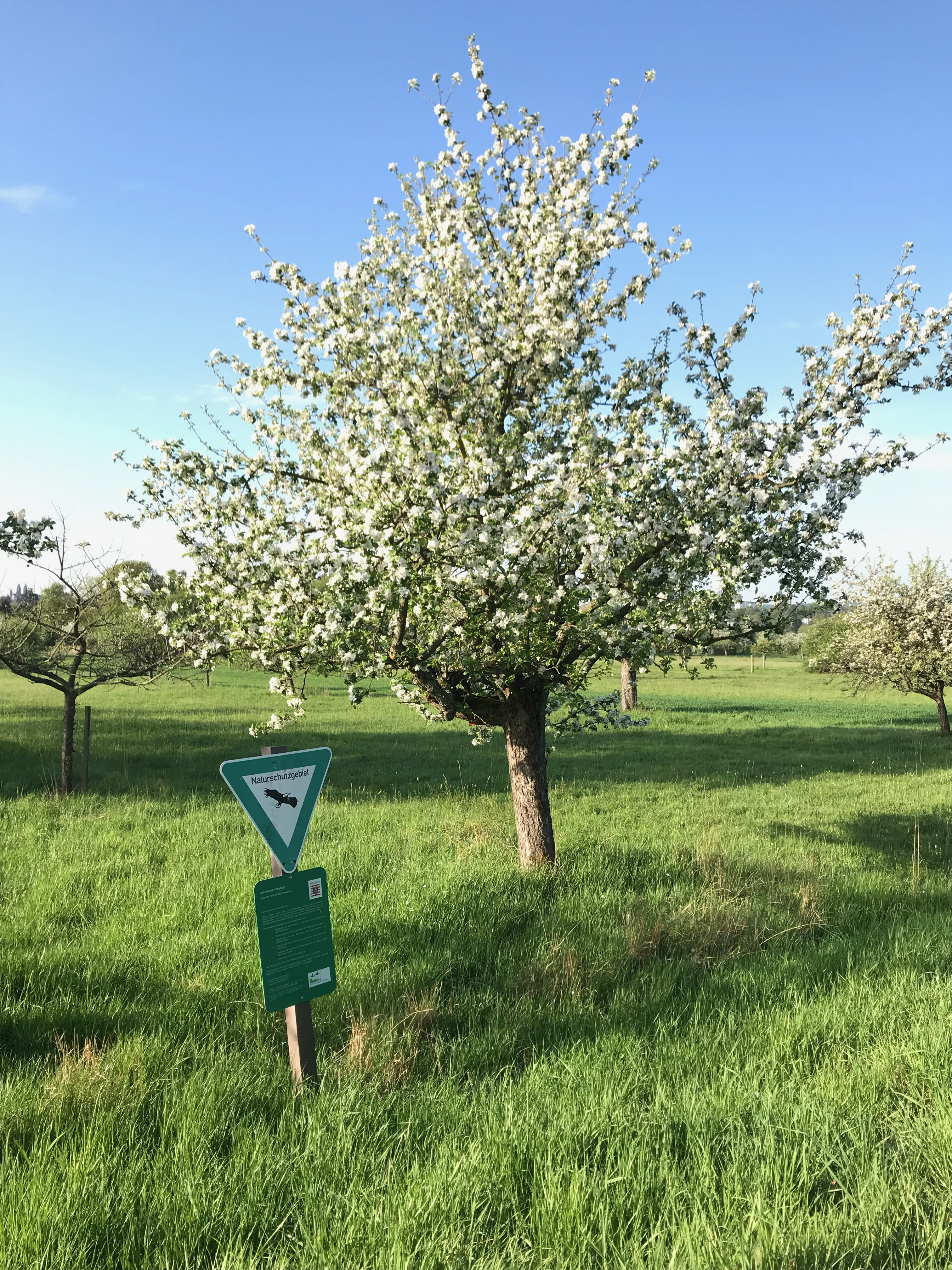 Apfelblüte im Naturschutzgebiet Kirdorfer Feld WDPA-ID: 164099